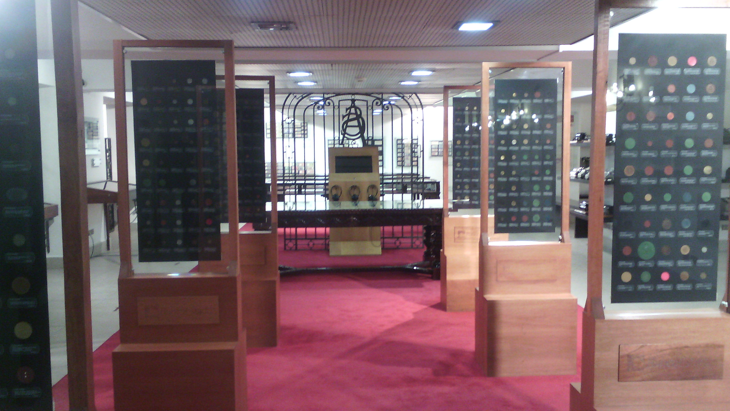 Exposición de monedas